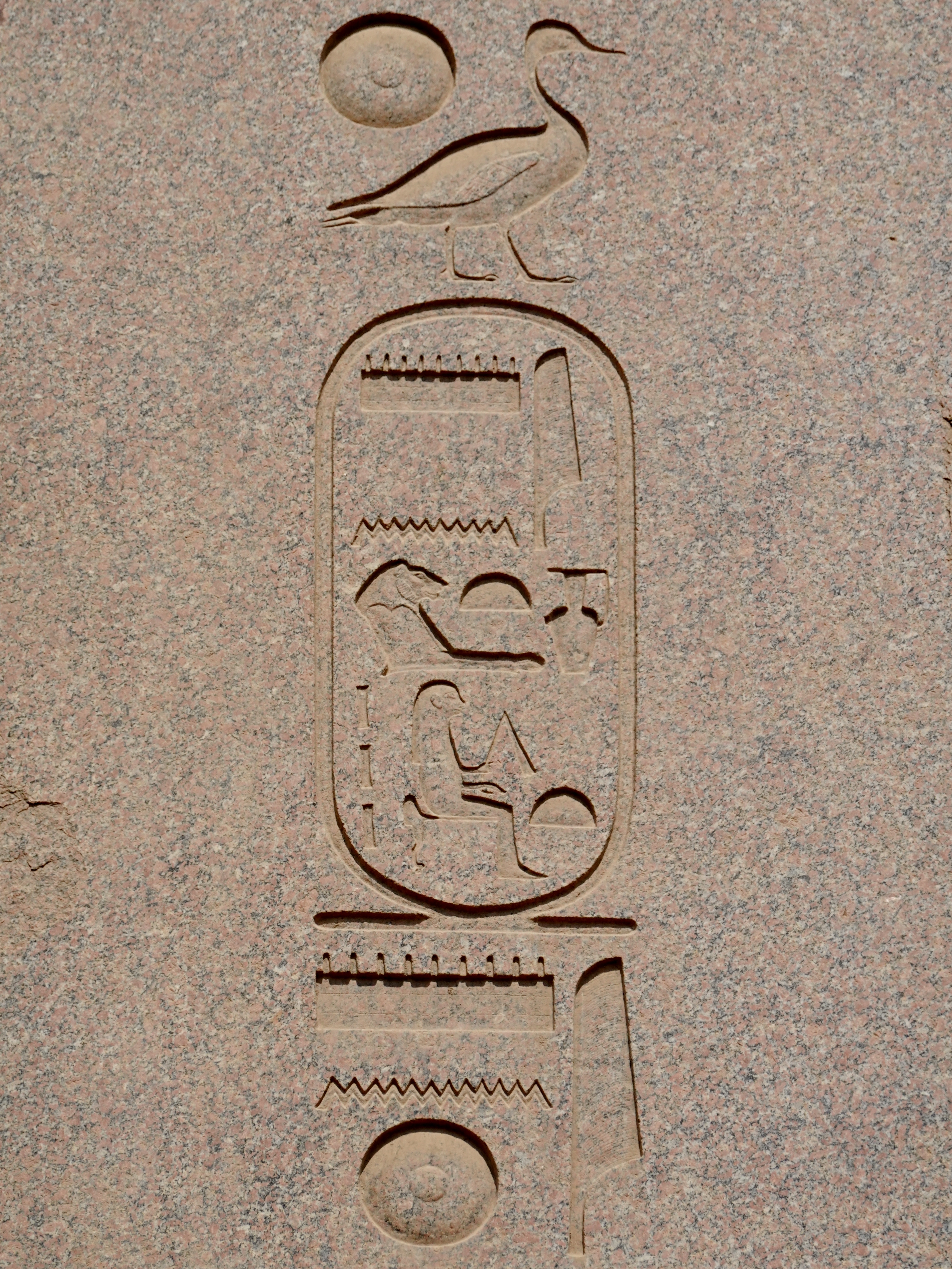 Kartusche der Königin Hatschepsut am Obelisk im Tempel von Karnak, nördlich von Luxor, Ägypten